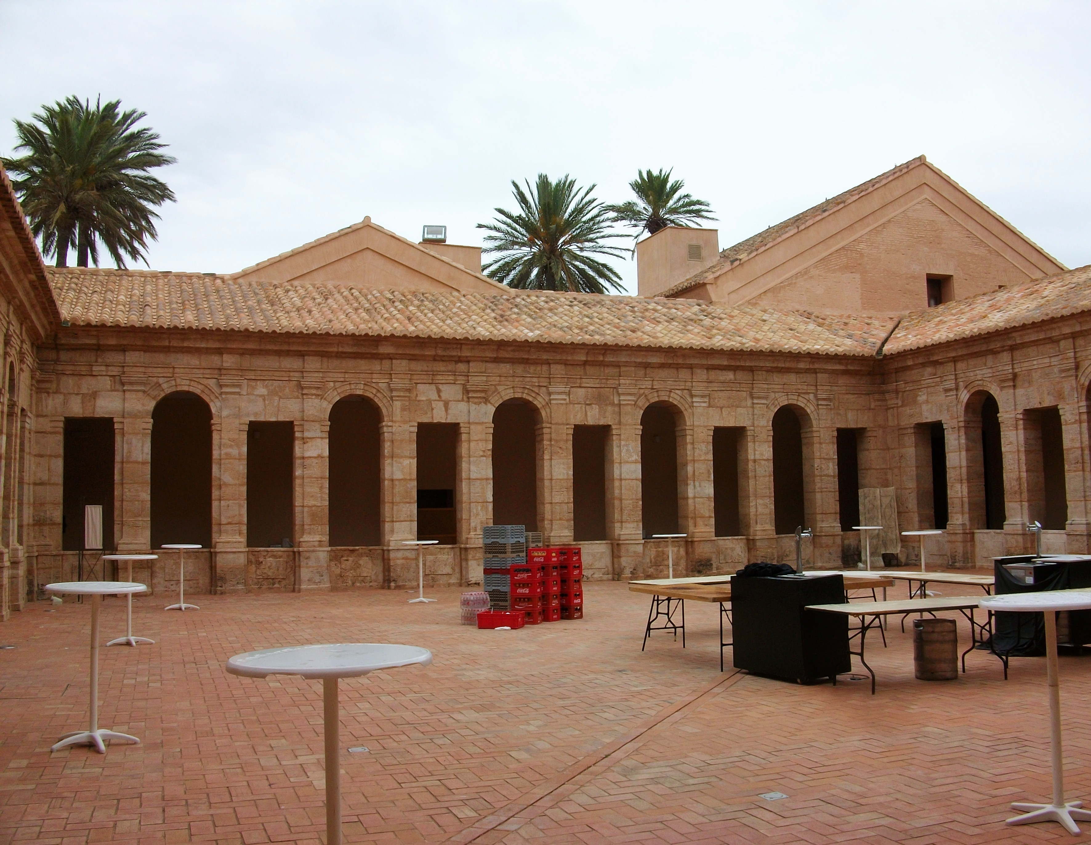 Claustre de llevant de la cartoixa d'Ara Christi.